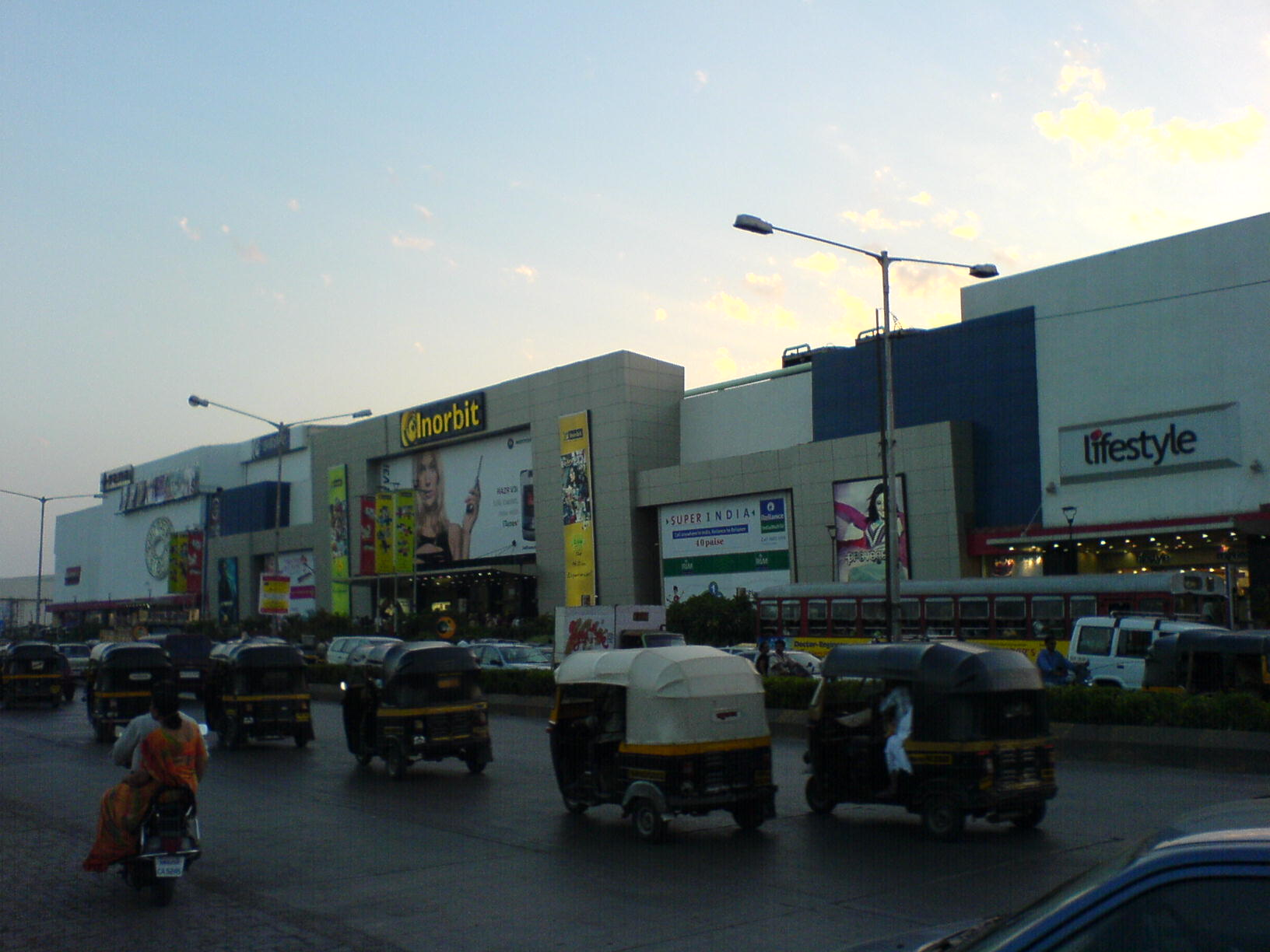 Inorbit Mall, Malad, Mumbai, India